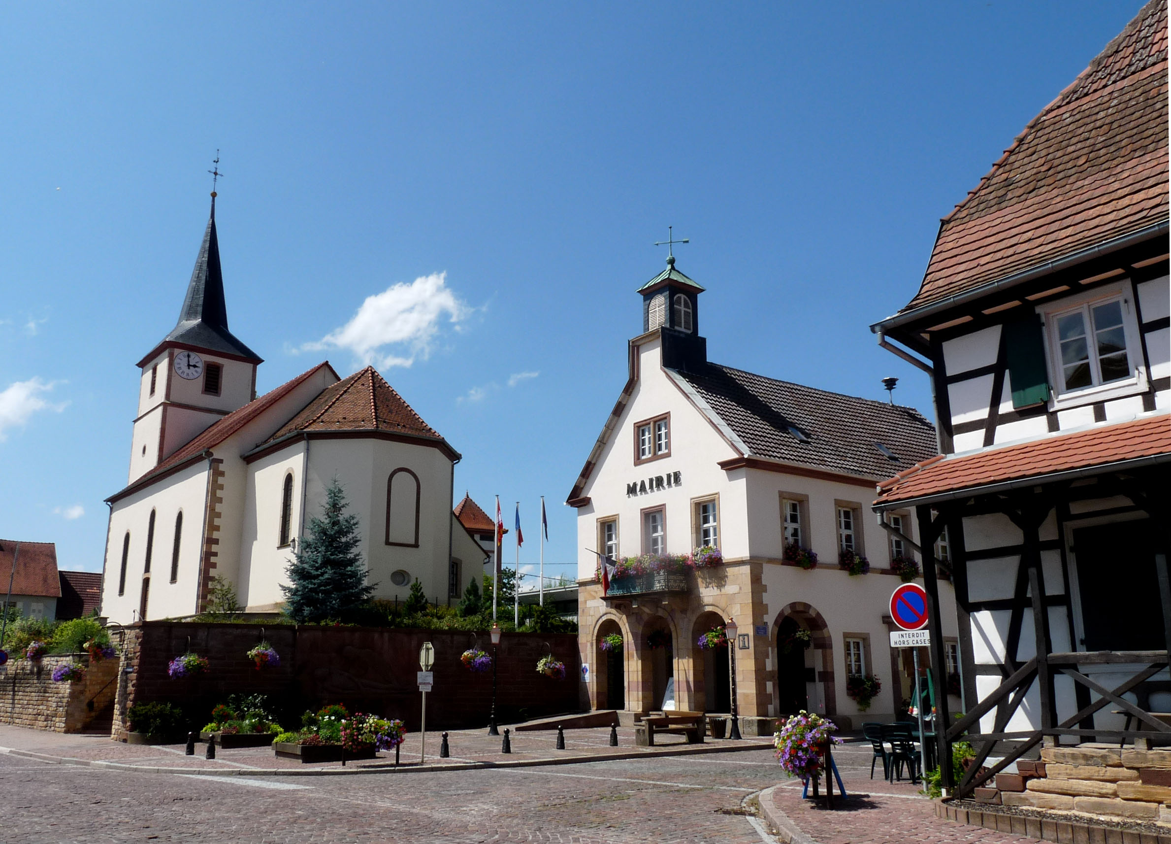 L'église luthérienne d'Oberbetschdorf et la mairie de Betschdorf (Bas-Rhin)